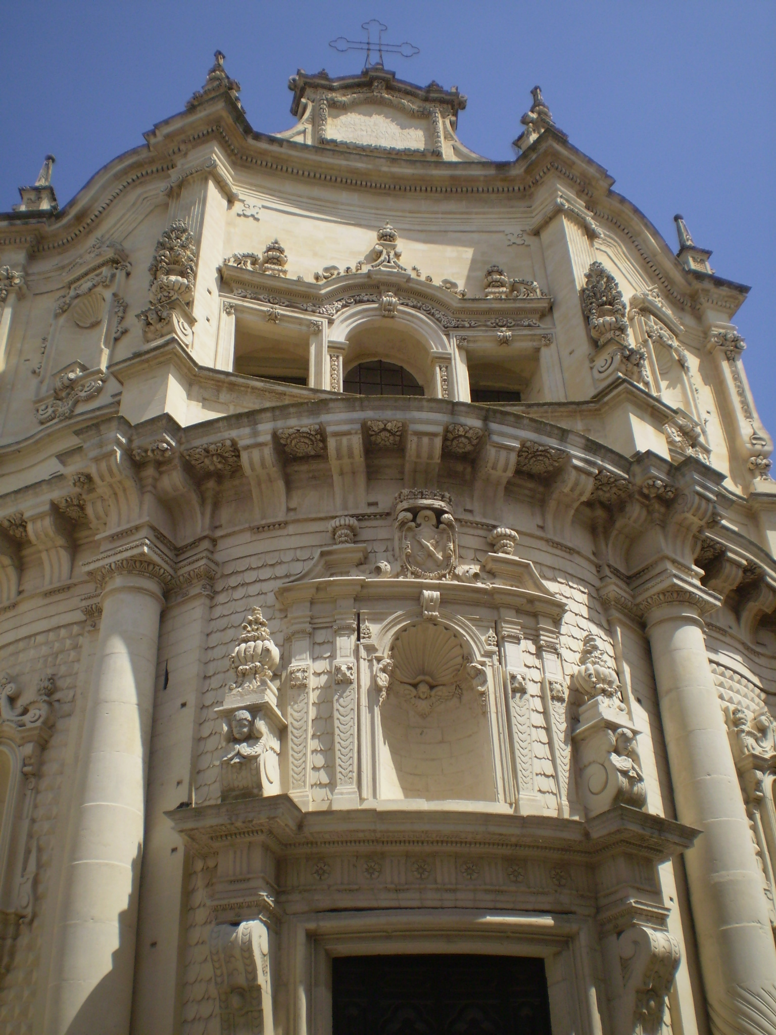 Chiesa di San Matteo a Lecce, esempio di Barocco Leccese